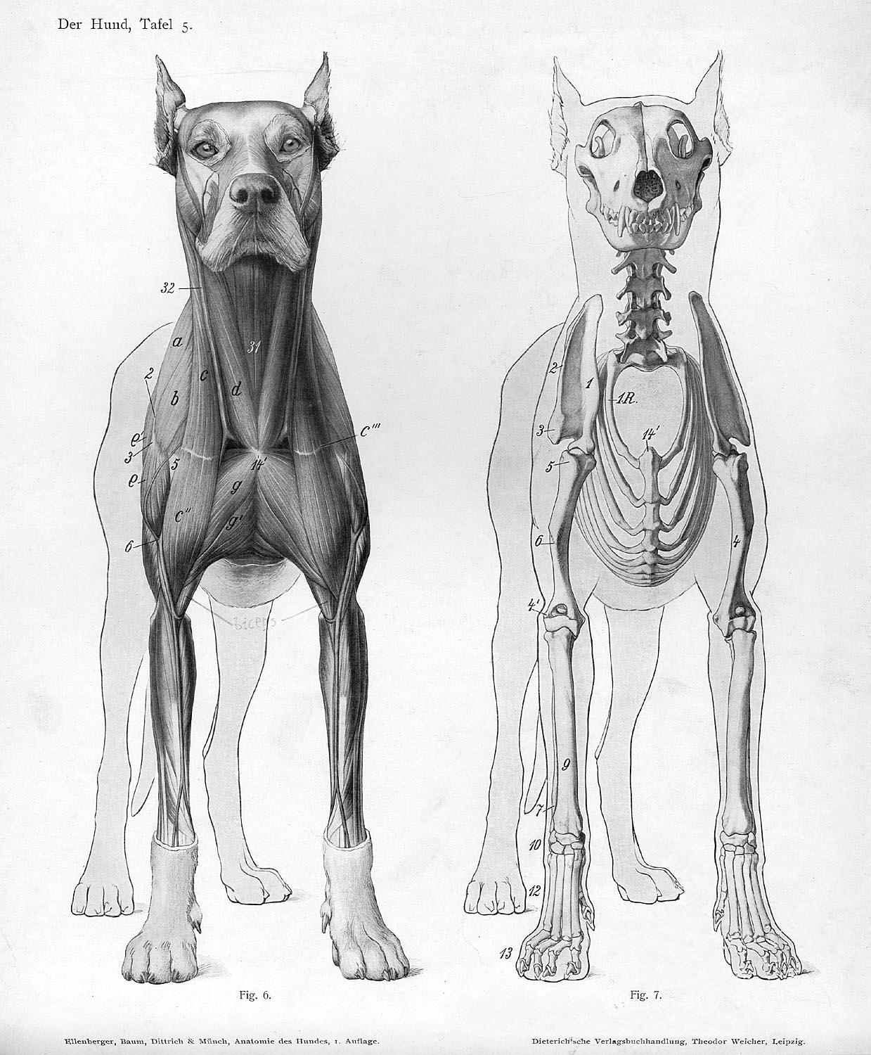 Animal anatomical engraving from Handbuch der Anatomie der Tiere für Künstler' - Hermann Dittrich, illustrator.